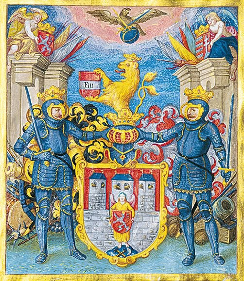 Tzv. velký znak města Českých Budějovic na privilegiu Ferdinanda III. z roku 1648 (s obměnami používaný do roku 1965)